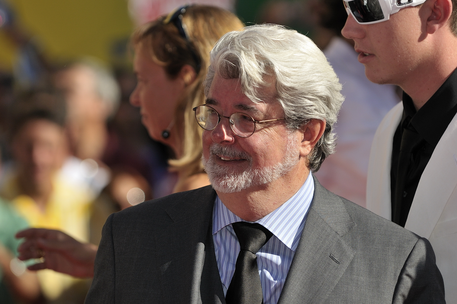 66ème Festival du Cinéma de Venise (Mostra), 5ème jour (06/09/2009) Geaorges Lucas et les réalisateurs de Pixar receoivent un Lion d'Or pour l'ensemble de leur carrière : John Lasseter (Toy Story, 1001 Pattes, Cars...), Brad Bird (Les Indestructibles, Ratatouille), Pete Docter (Monstres et Cie, Là-haut), Andrew Stanton (Le Monde de Nemo, WALL•E) et Lee Unkrich (Toy Story 2, Monstres et Cie, Le Monde de Nemo)